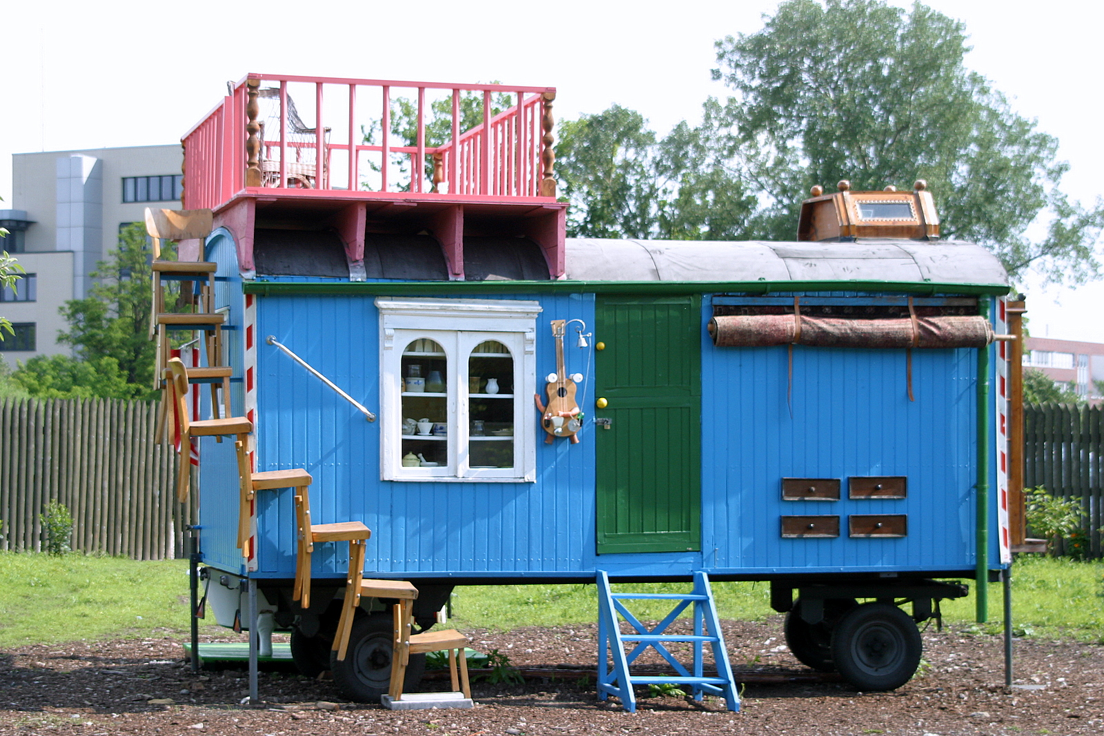 Original Bauwagen Löwenzahn im Filmpark Babelsberg